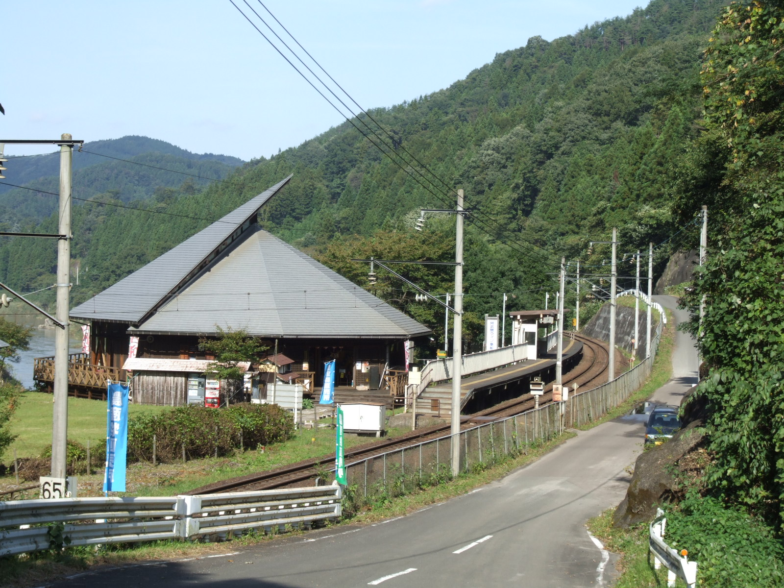 Abukuma Station of the Abukuma Kyūkō Railway. Marumori, Miyagi prefecture, Japan.